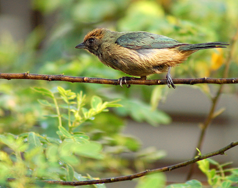 Tangara_Cayana immature